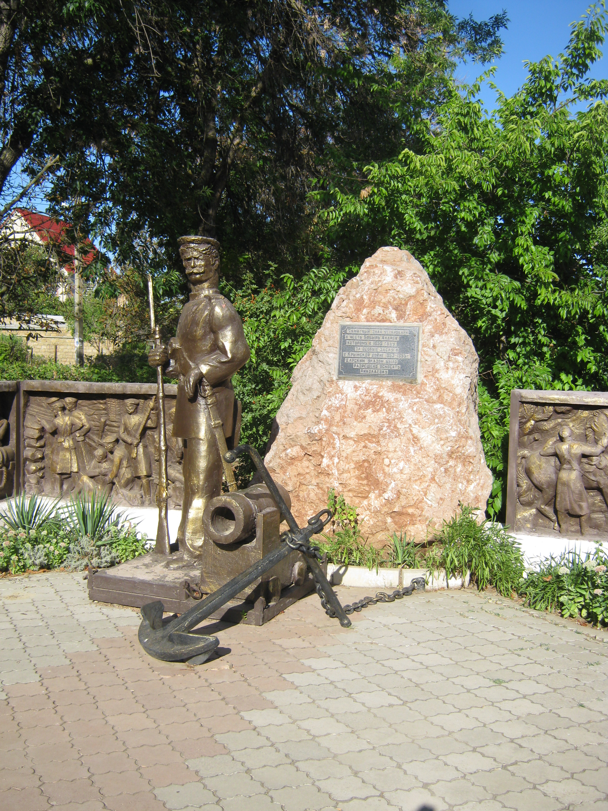 Памятник матросу Андрею Бобырю основателю Николаевки (Крым) 2